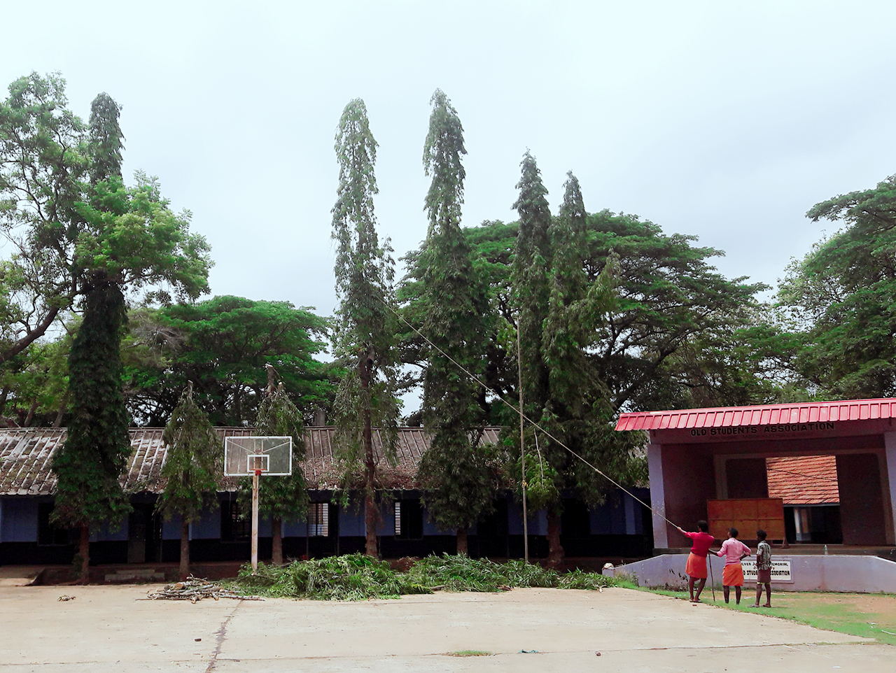 അരണമരം ശാസ്ത്രീയനാമം: Polyalthia longifolia കുടുംബം Annonaceae.